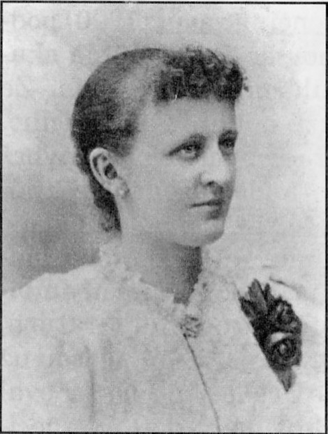 spisovatelka Popelka Biliánová